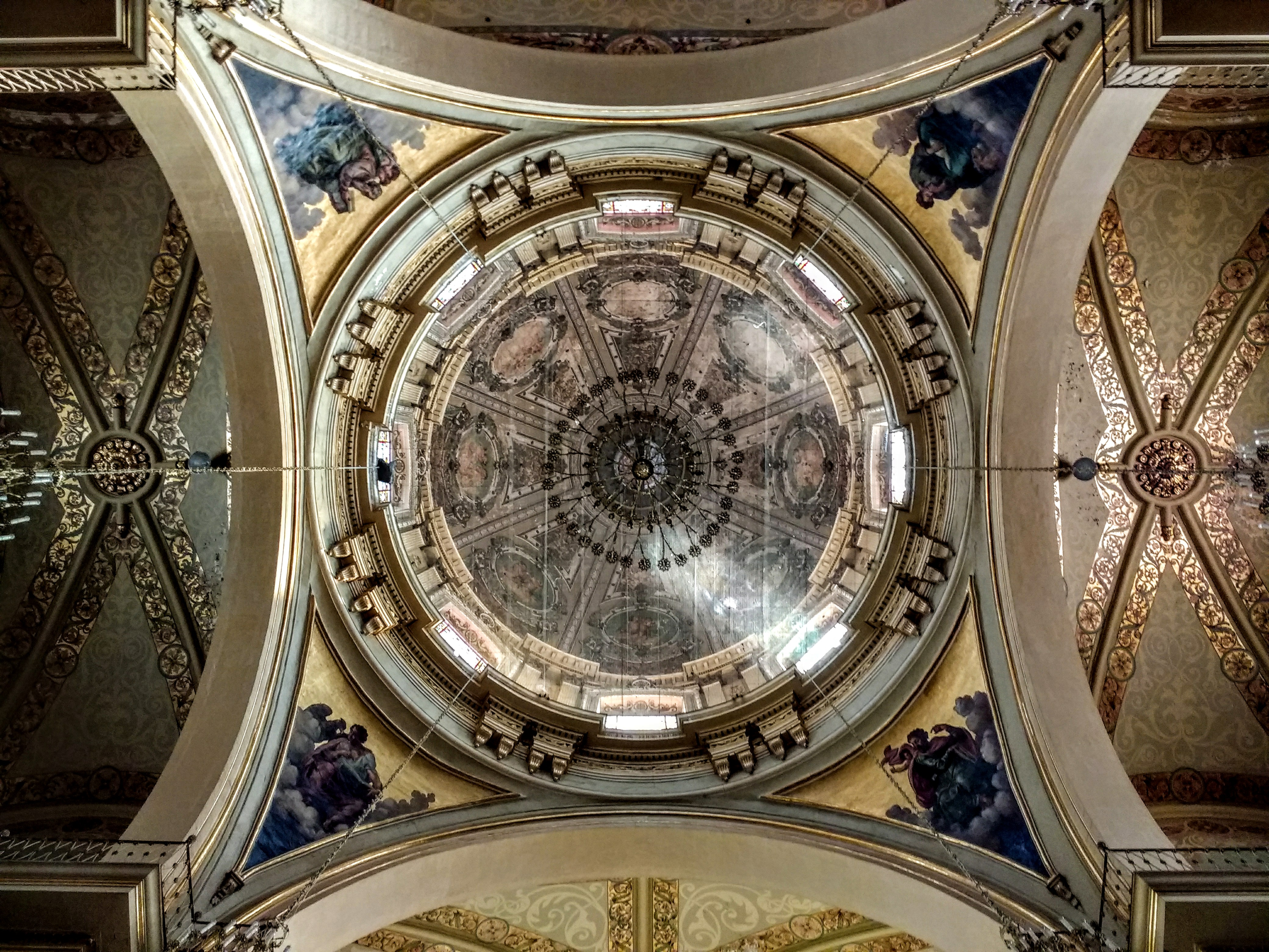 Cúpula de la Catedral